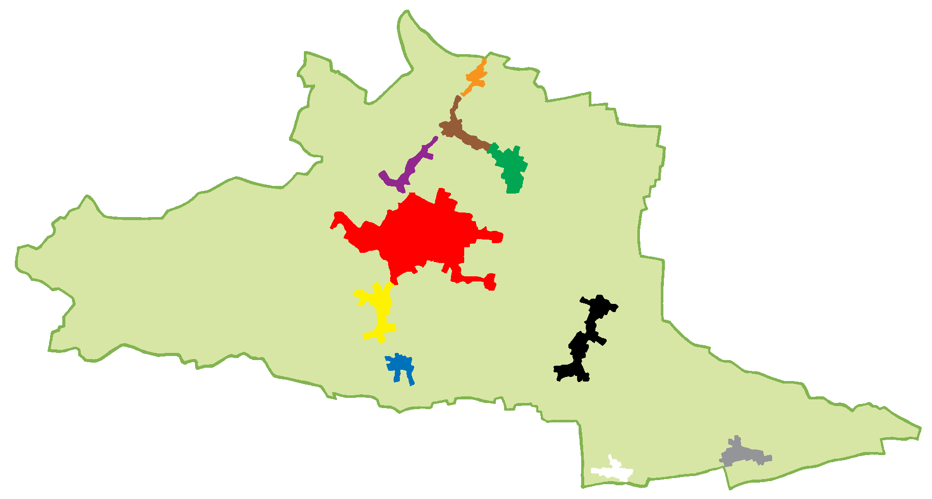 Carte des parties de Neustadt jaune : Hambach orange : Königsbach rouge : Neustadt-centre vert : Mußbach bleu : Deidesfeld violet : Haardt brun : Gimmeldingen gris : Geinsheim noir : Lachen-Speyerdorf blanc : Duttweiler